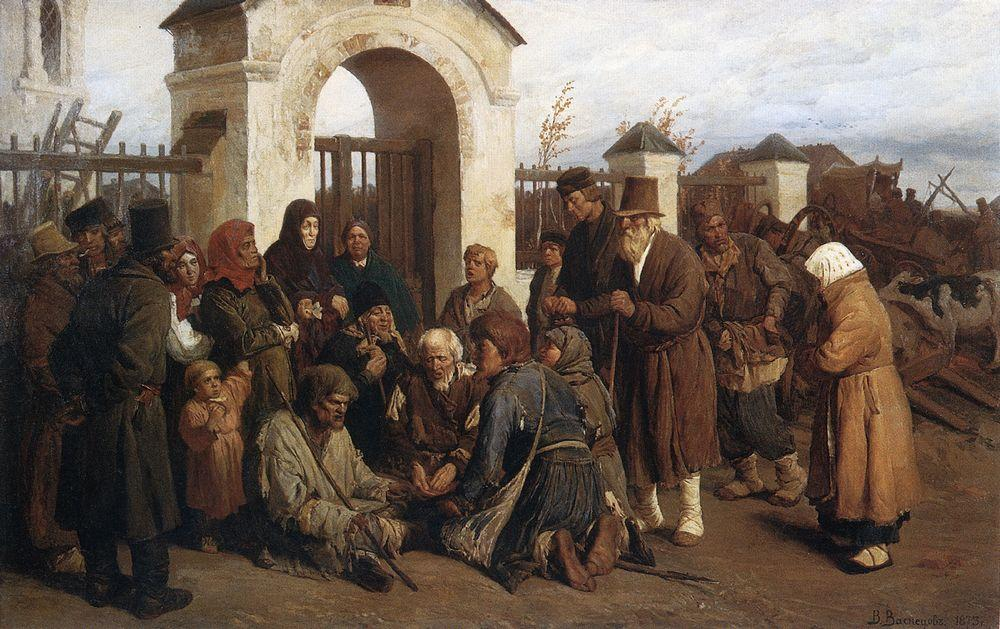 Нищие-певцы (Богомольцы)